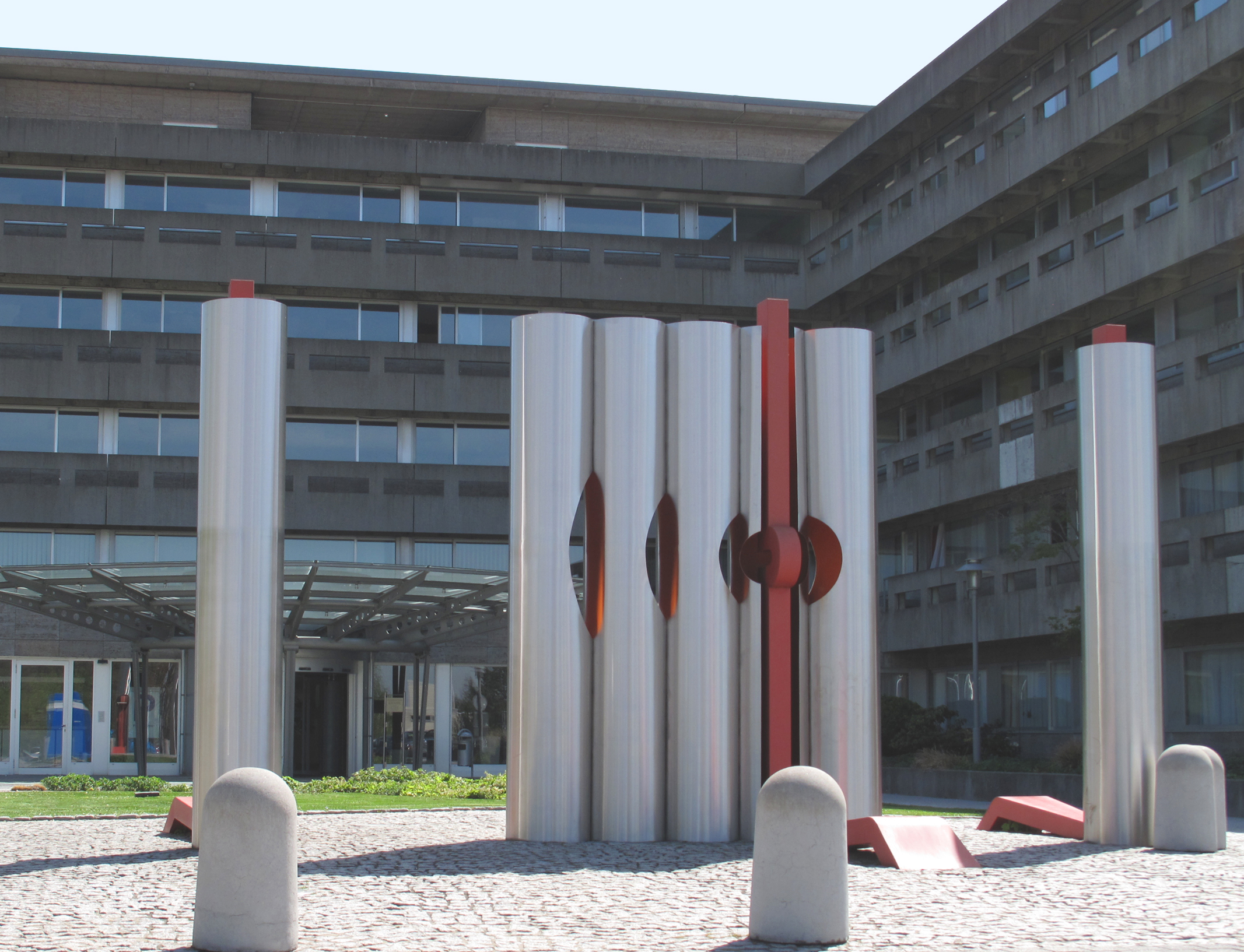 Gerlinde Beck, Tor des Vertrauens, 1974/76, - Deutschland, Baden-Württemberg, Mühlacker, Enzkreis-Klinik